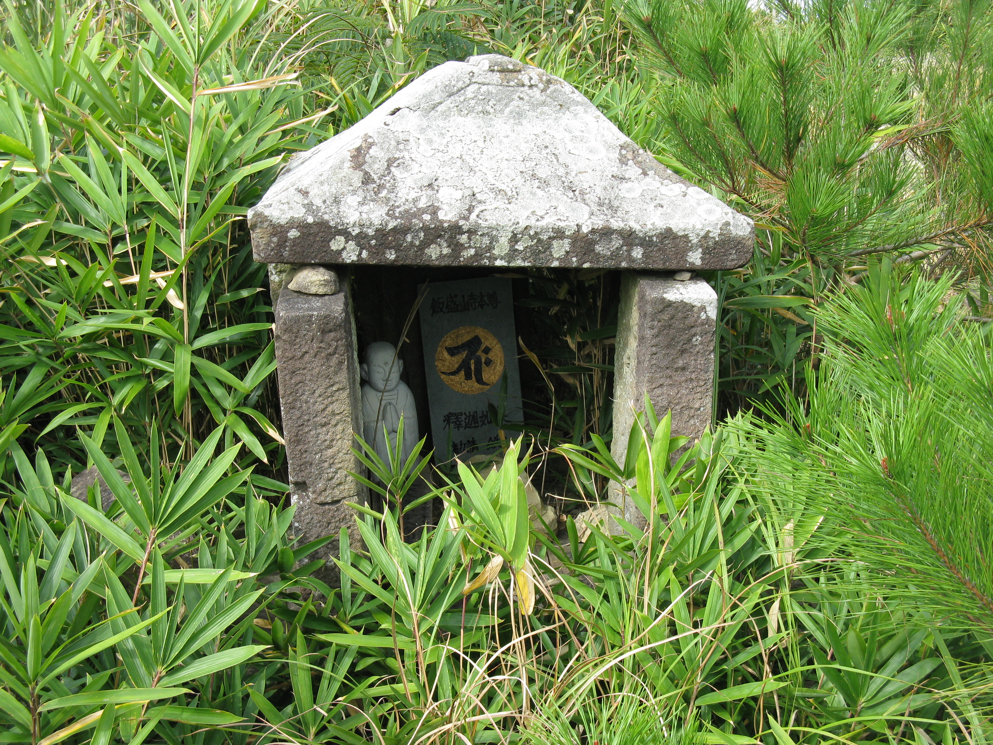 飯盛山 (岬町) 別名・泉南飯盛山 山頂の祠